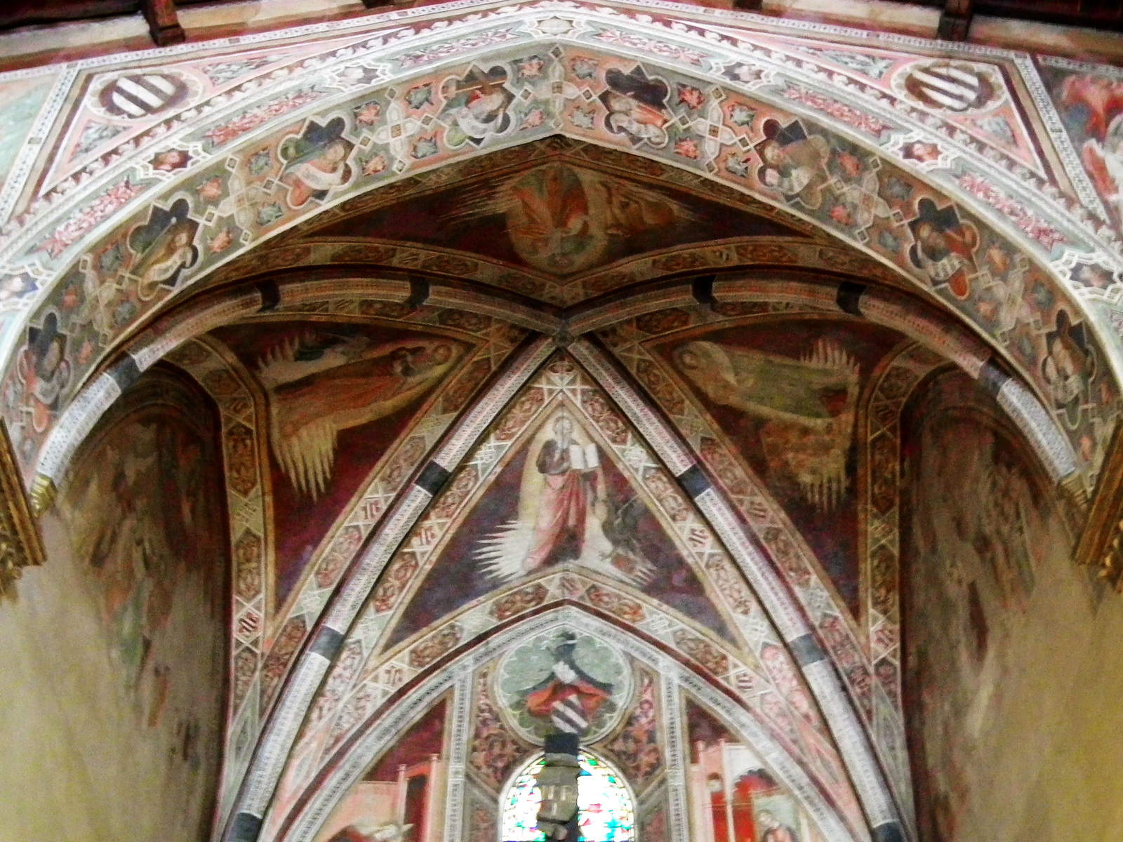 Chiesa di San Francesco, Pescia, Italy